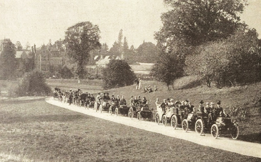 Promenade Londres-Southsea 1901 (La Vie au Grand Air du 8 décembre 1901, p.732)